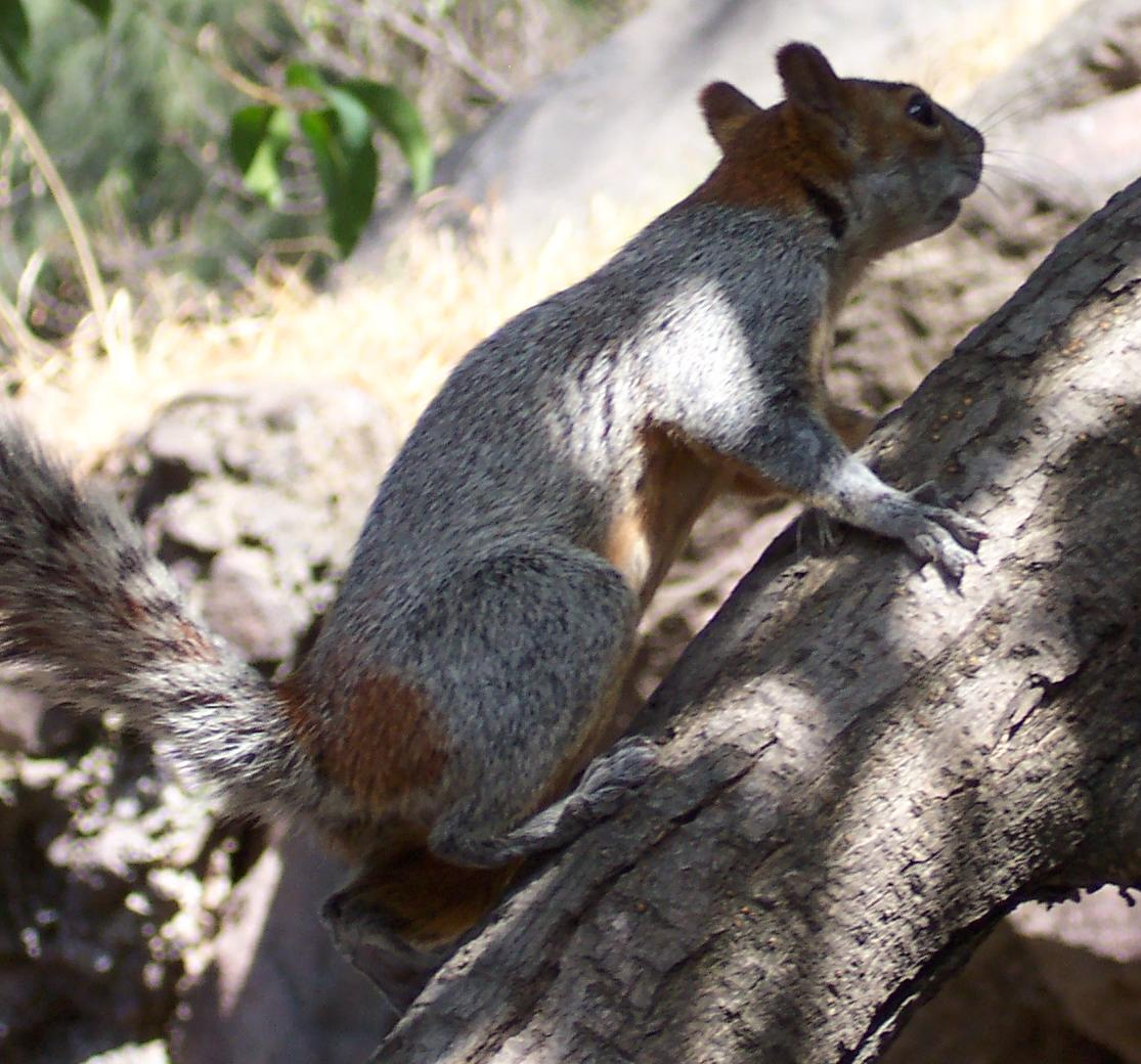 Mexican Gray Squirrel Sciurus aureogaster